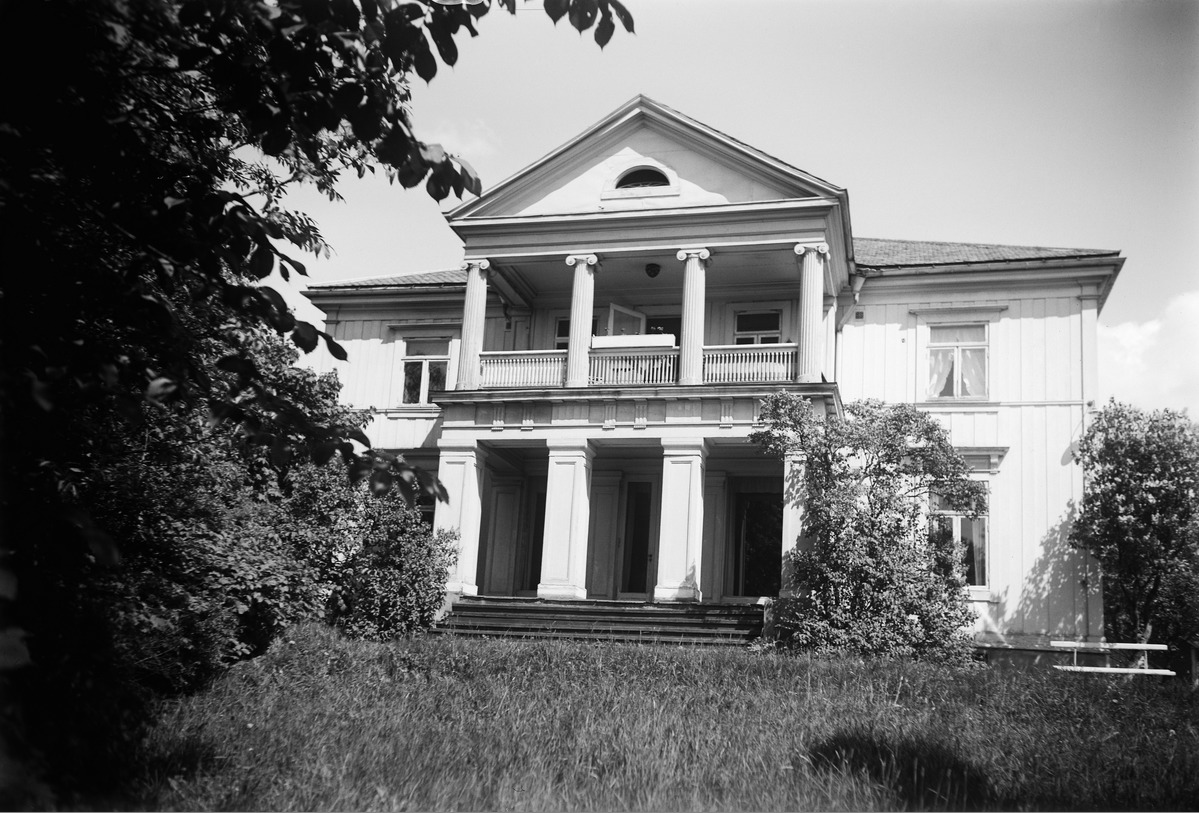 Bakkehaugen gård, bolighus, søyler, hage. Einar Høigårds vei 25. Tidligere enebolig til boktrykker Carl Grøndahl. I dag blir huset brukt som institusjon, Bakkehaugen barnehage og Bakkehaugen ungdomshjem, drevet av Barne- og familieetaten, Oslo kommune. Esther Langberg fotograferte bl.a. for bladet Urd. Hun testamenterte ca 1600 negativer til Oslo Bymuseum i 1975.